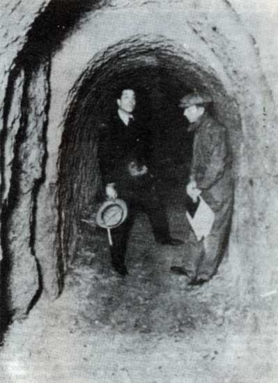 Durante las obras de demolición del edificio colonial del Colegio Nacional de Buenos Aires y construcción del edificio moderno, entre 1910 y 1937, se descubrieron túneles coloniales que conectaban la Manzana de las Luces donde el colegio estaba emplazado con otras instituciones de la época colonial como el Cabildo, túneles cuya existencia había permanecido en secreto hasta ese momento. La foto, tomada en 1920, muestra uno de esos túneles y a la derecha a Héctor Greslebin, quien presentó el primer resumen completo de los conocimientos e hipótesis serias acerca de los túneles y obras subterráneas. La foto fue publicada en un artículo del diario La Prensa en 1964. Descargada de